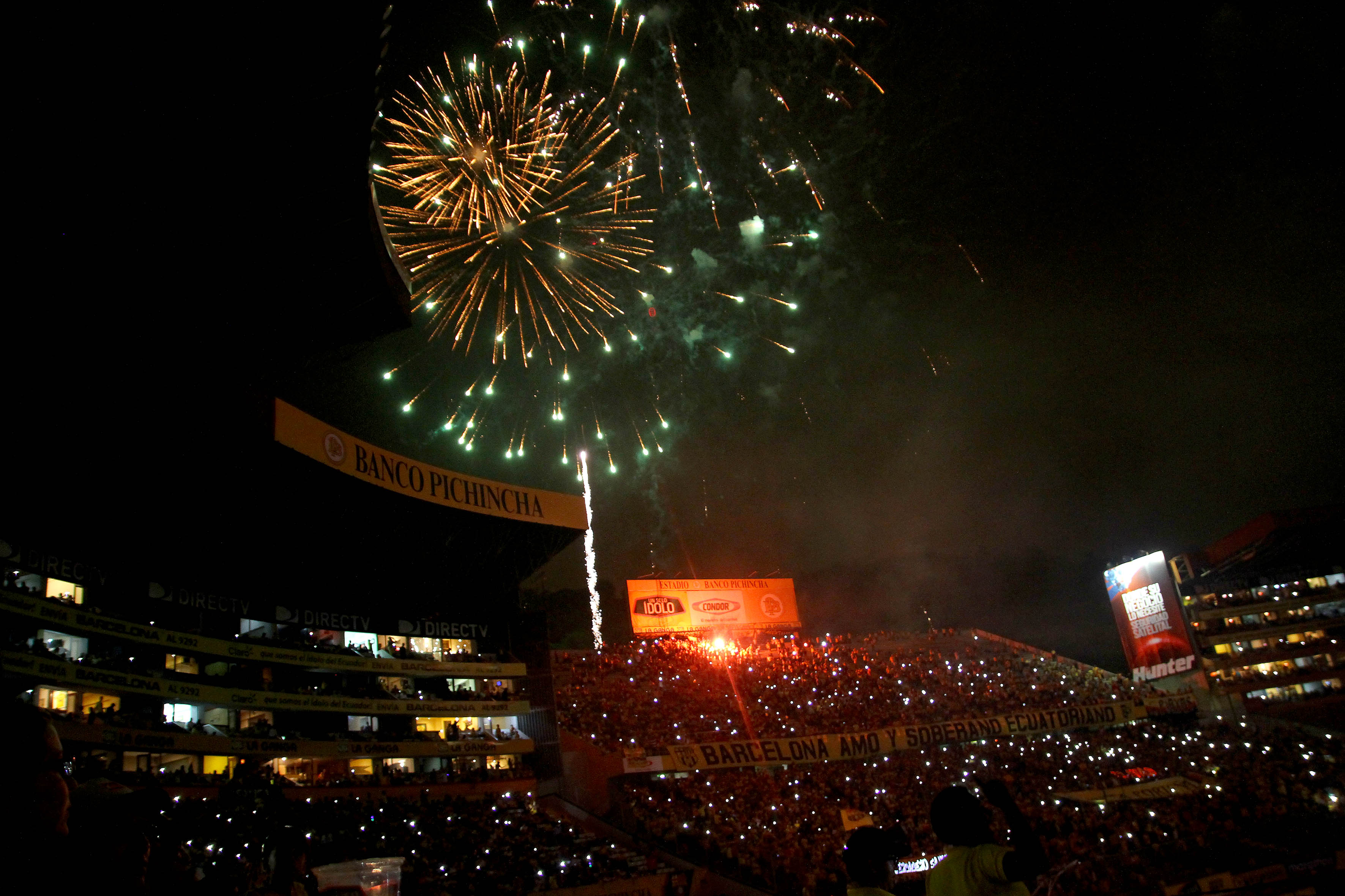 Guayaquil, miércoles 28 de enero del 2015 (ANDES).-Barcelona realizó la Noche Amarilla, donde presentó su plantilla para el campeonato 2015 Foto:César Muñoz/ANDES